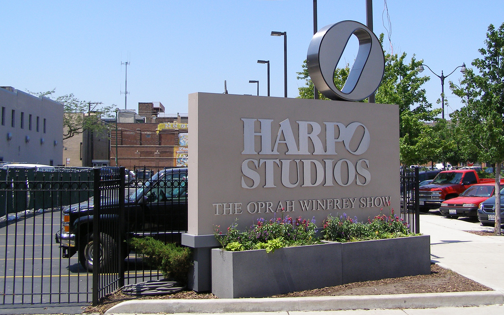 Harpo Studio sign